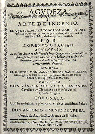 Descripción sintética Baltasar Gracián, Agudeza y arte de ingenio..., Huesca, Juan Nogués, 1648. Descripción analítica:AGUDEZA/ Y/ ARTE DE INGENIO,/ EN QUE SE EXPLICAN TODOS LOS MODOS Y DIFE-/ rencias de Concetos, con exemplares escogidos de todo lo / más bien dicho assi sacro, como humano./ POR/ LORENÇO GRACIAN./ AUMENTALA el mesmo Autor en esta segunda impresión, con un tratado de los/ Estilos, su propiedad, ideas del bien hablar: con el/ Arte de/ Erudicion y modo de aplicarla; Crisis de los Au-/ tores y noticias de libros./ ILUSTRALA/ EL DOCTOR DON MANUEL DE SALINAS Y LIZANA,/ Canonigo de la Cathedral de Huesca, con saçonadas traduc-/ ciones de los Epigramas de Marcial./ PUBLICALA/ DON VINCENCIO IUAN DE LASTANOSA/ Cavallero y Ciudadano de Huesca, en el/ Reyno de Aragón./ CORONALA/ con su nobilisima protección, el Excelentíssimo Señor/ DON ANTONIO XIMENEZ DE URREA,: Conde de Aranda & Grande de España./ Con licencia. Impresso en Huesca, por IUAN NOGUES, al Coso,/ Año MDCXLVIII.